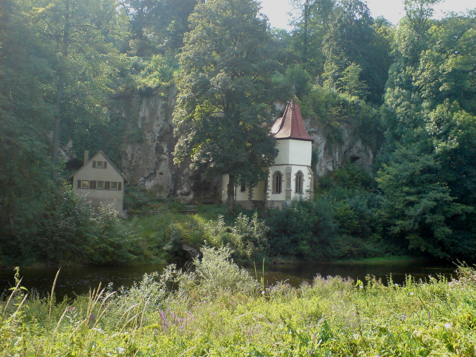 Die Kapelle St. Wendel zum Stein an der Jagst zwischen Dörzbach und Hohebach. Hinter der Kapelle: Mächtiges Karbonat-Sediment, aus Wasser ausgefällt. Diese Kalktuffbarre ist eine Erscheinung der verkarsteten Muschelkalk-Formation des Südwestdeutschen Schichtstufenlands.